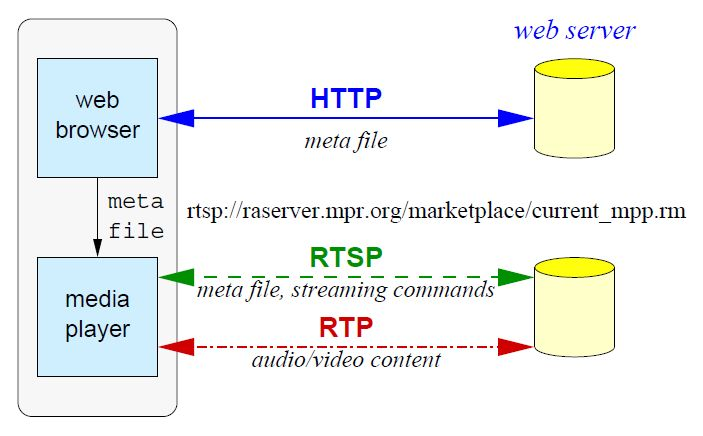 Монгол: Зураг.1 RTP протоколоор аудио болон видео өгөгдлийг үздэг.